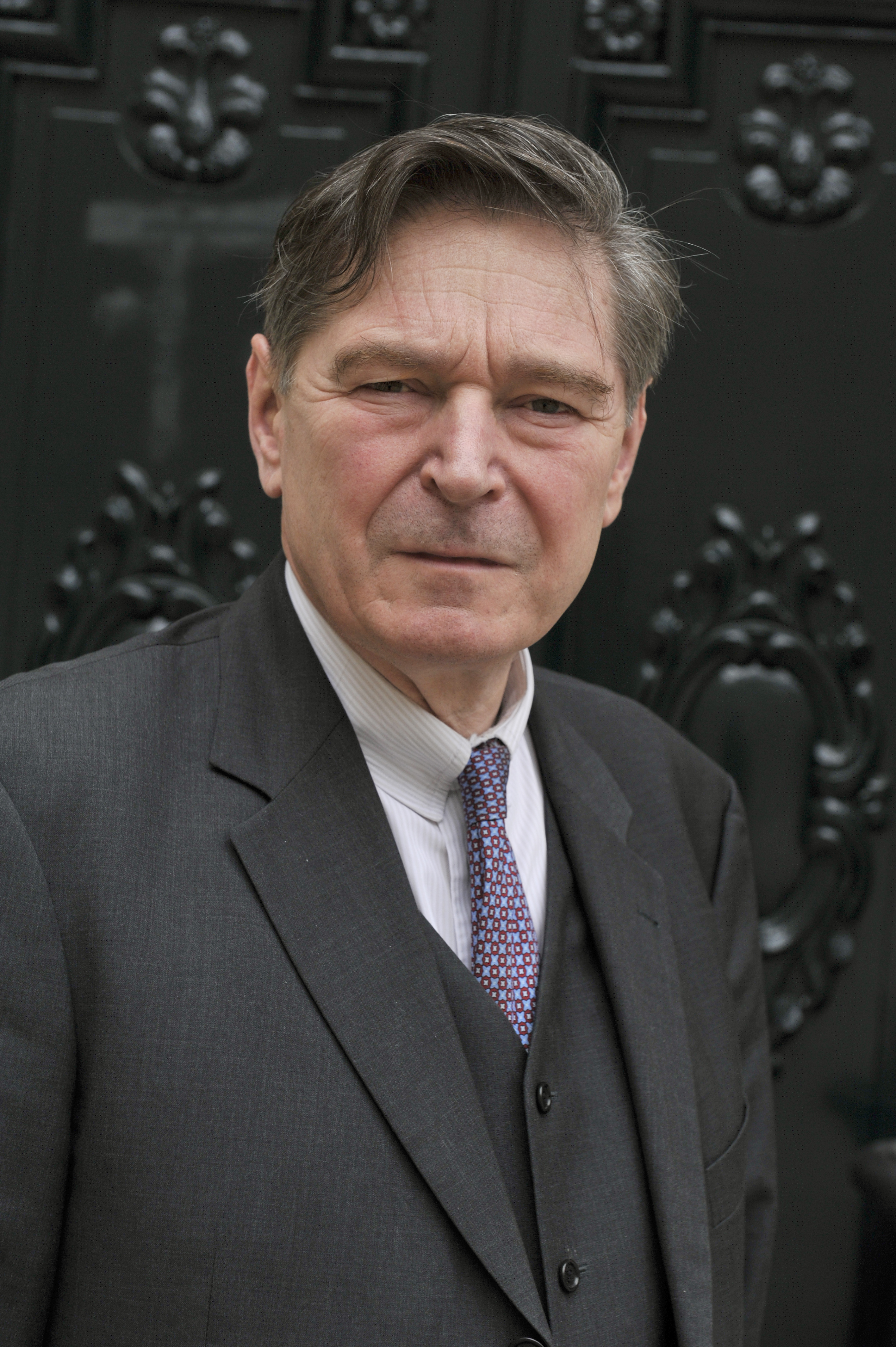 Portrait de Jean-Michel Leniaud